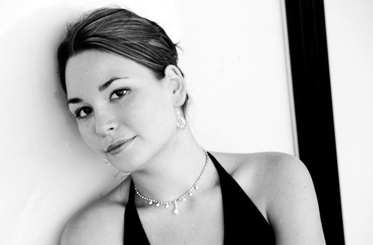 Cornelia Lanz - Mezzosopranistin